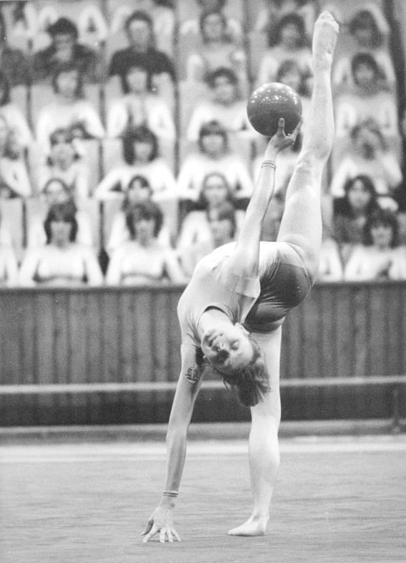 Sabine Plötz ADN-ZB Mittelstädt 01.06.79 Berlin: Festival - Ein Nationales Schauturnen und Übungen in der Leistungsgymnastik fanden heute anläßlich des Nationalen Jugendfestivals in der Dynamo-Sporthalle statt. Sabine Plötz verriet beachtliches Können bei ihrer Übung mit dem Ball.